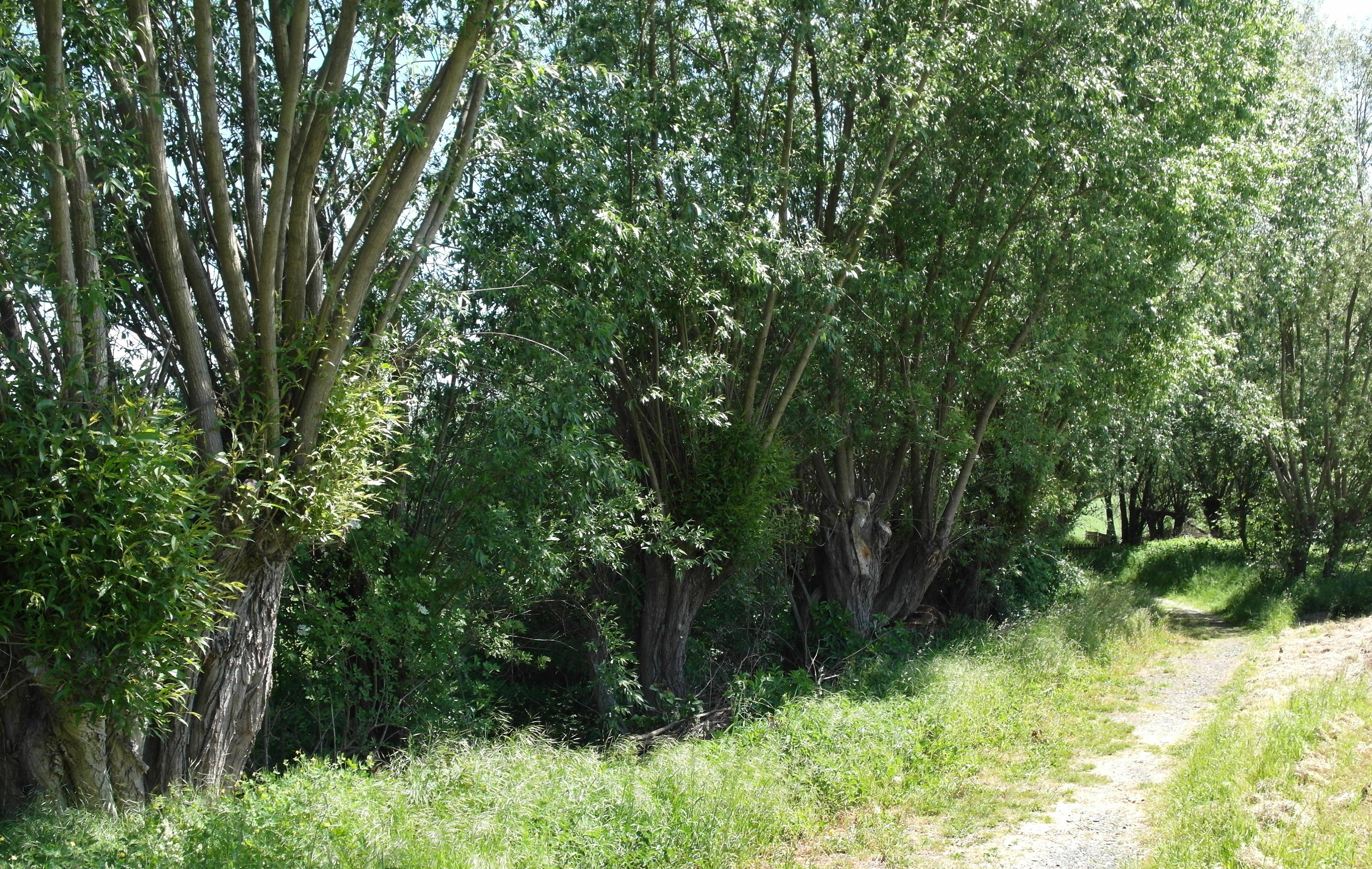 20.05.2018 01728 Hänichen / Rippien (Bannewitz): Alte Weidenbäume am Oberlauf des Geberbaches im Bereich von GMP: 50.976537,13.728245. [SAM6265.JPG]20180520115DR.JPG(c)Blobelt